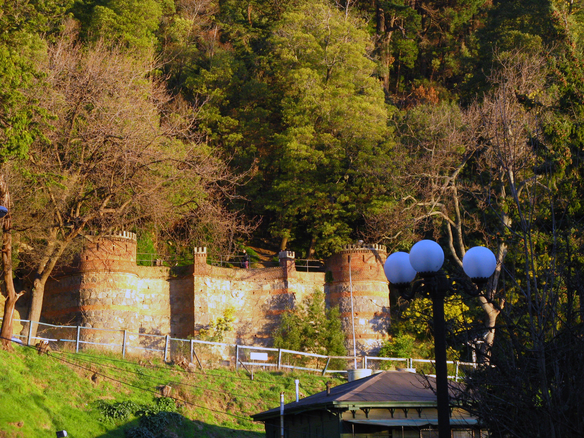 Faldas del Cerro Caracol desde el Parque Ecuador Concepción, Chile Julio de 2012